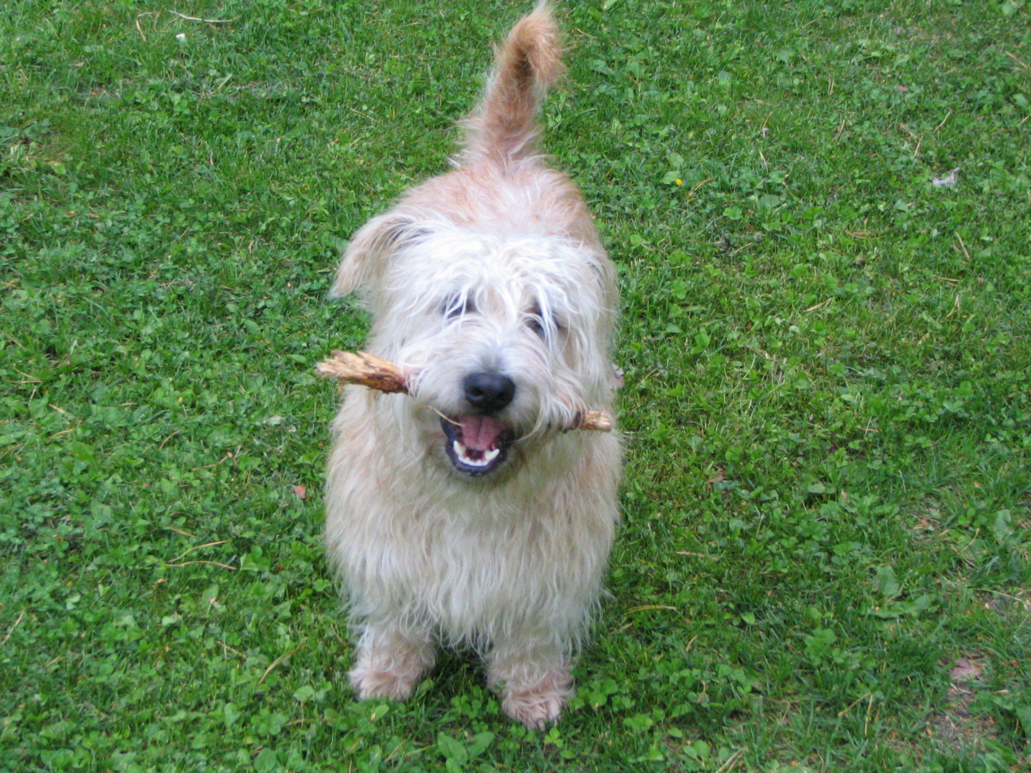 Glen of Imaalinterrieri